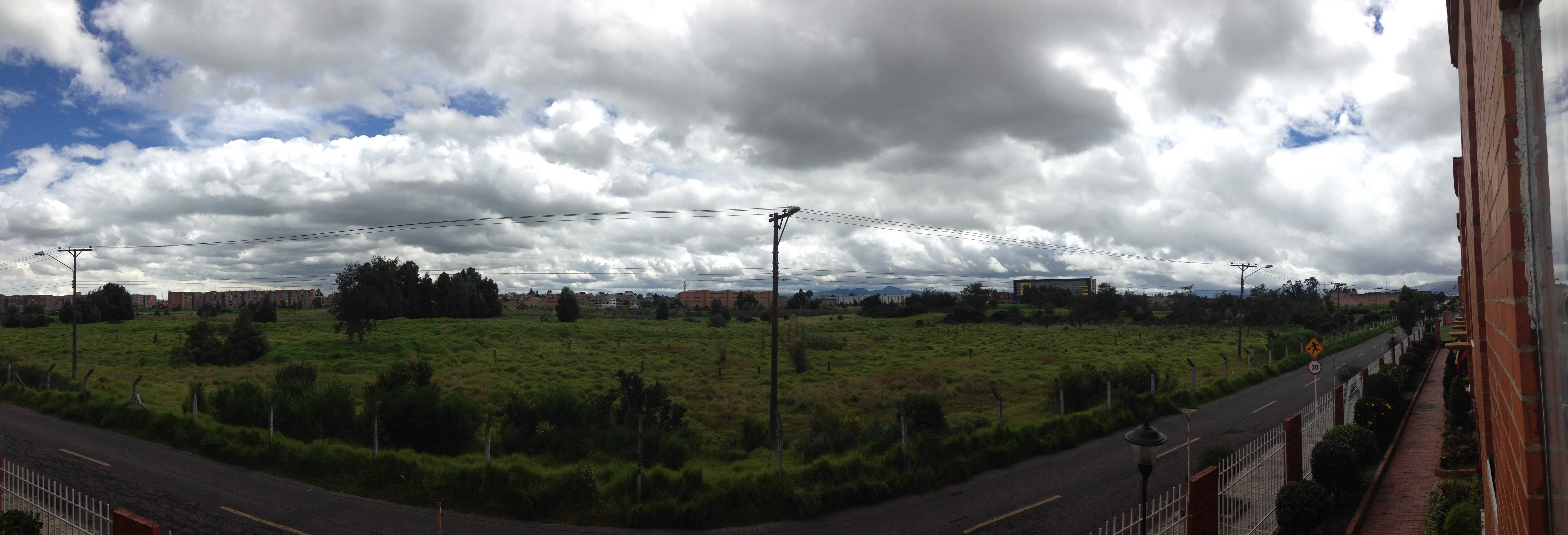 Panorama of Humedal Capellania